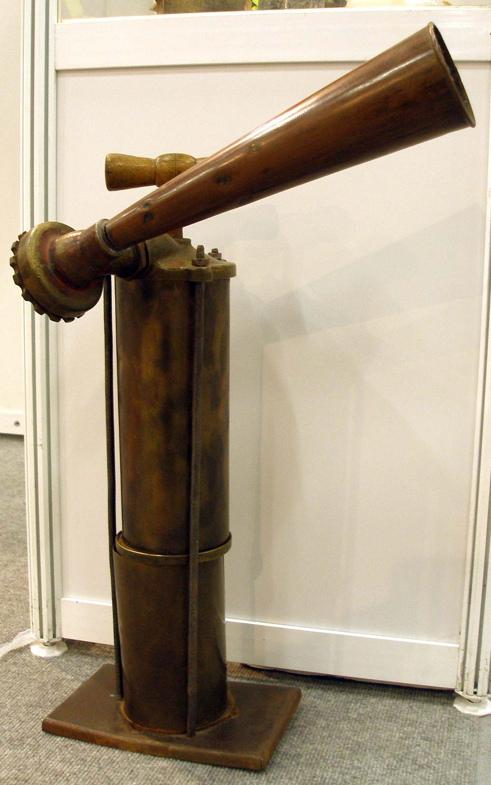 Leofon